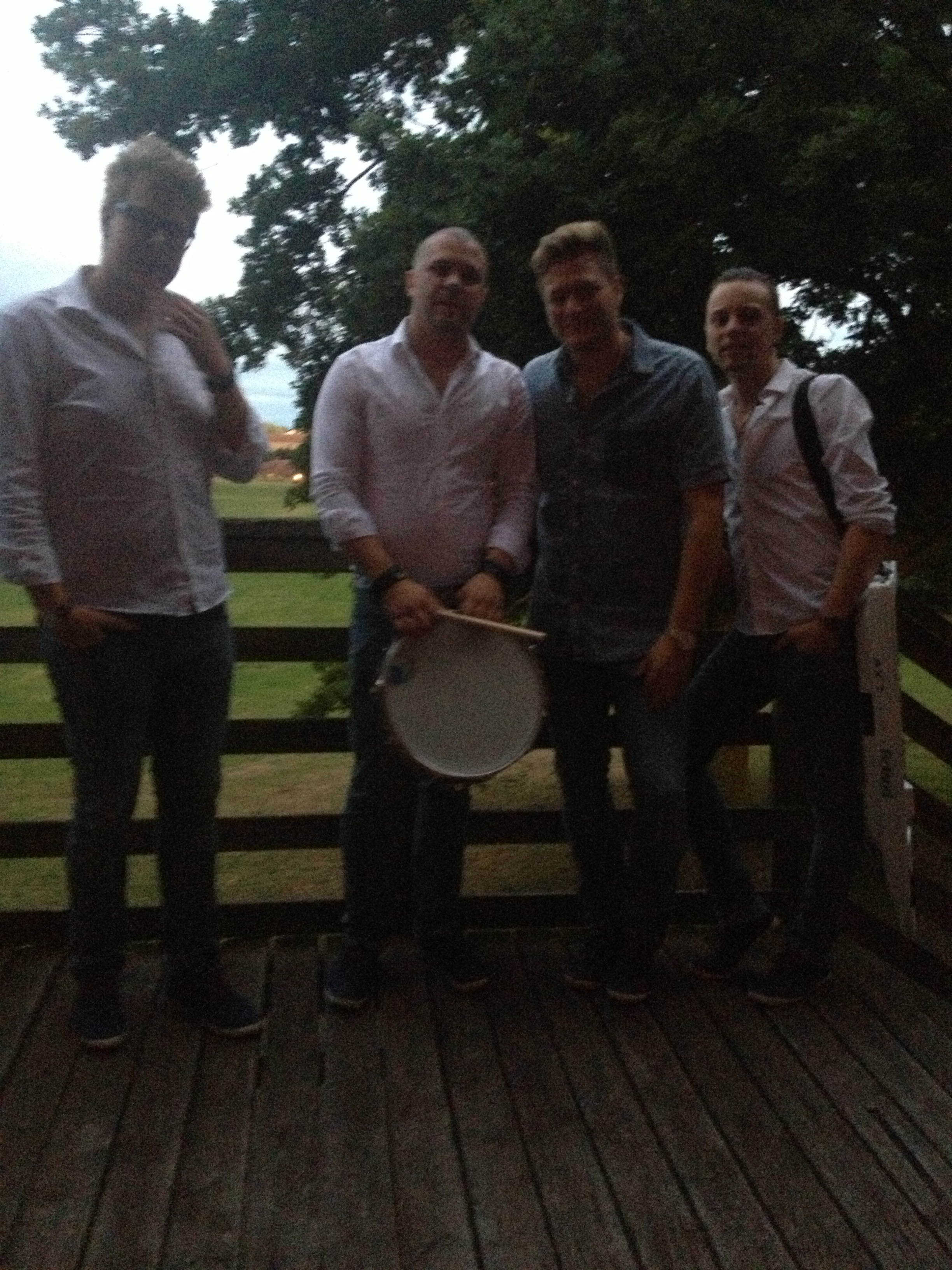 Dansbandet Sannex på Skälby Loge i Kalmar, Sverige.